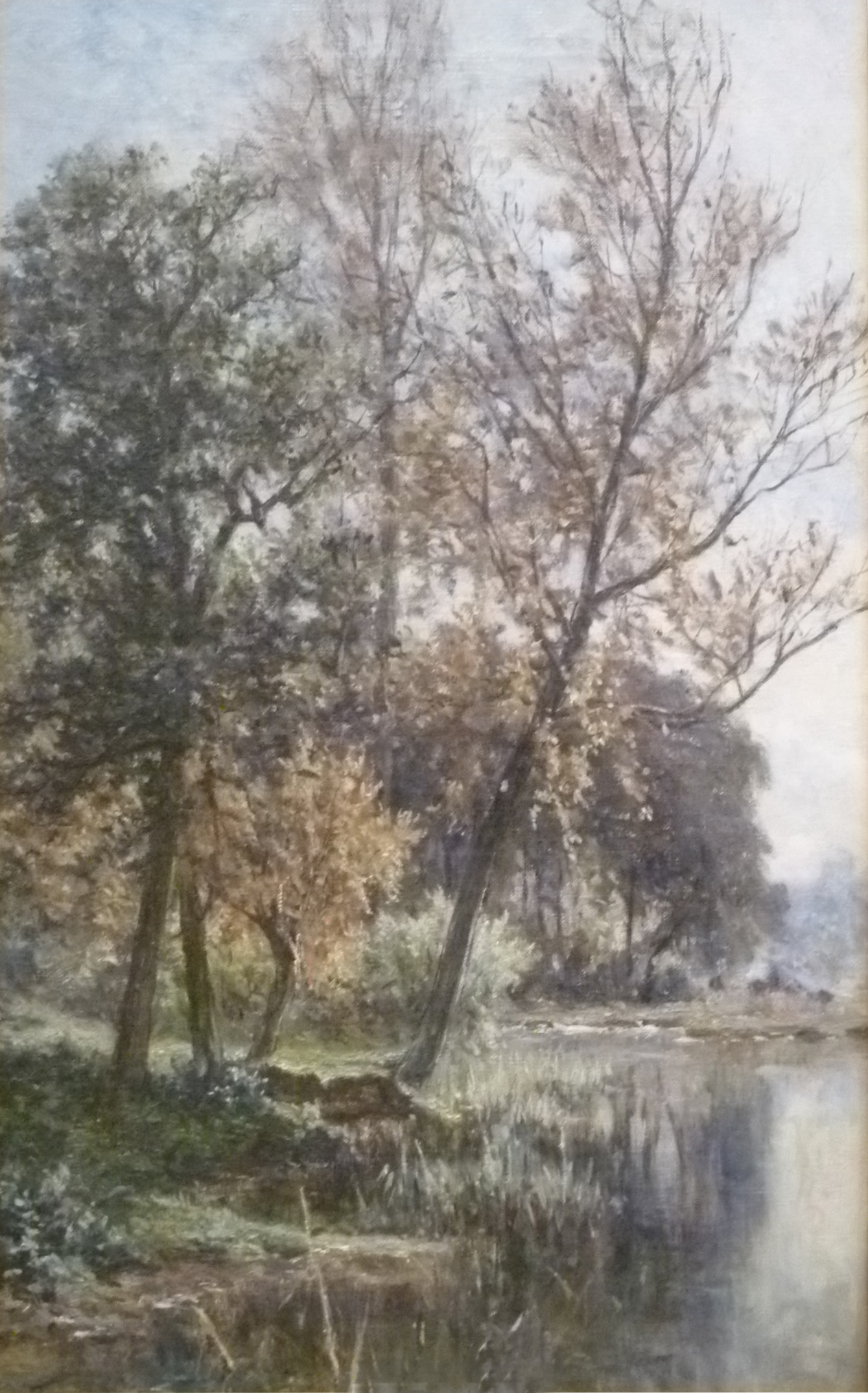 "Parkzicht", olieverf op doek (54 x 34 cm) door de Belgische kunstschilderes Euphrosine Beernaert (1831-1901); privébezit